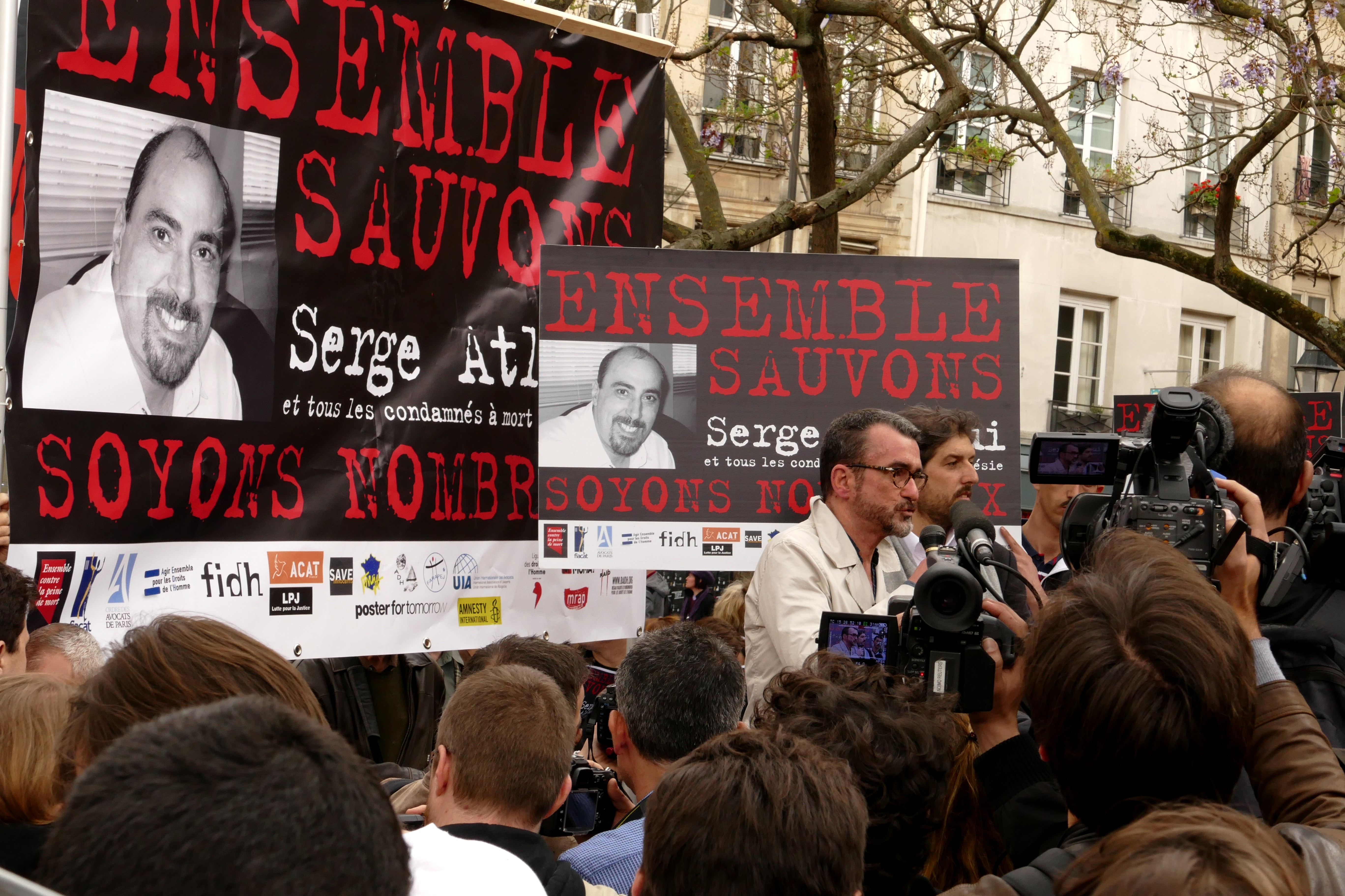 Manifestation de soutien à Serge Atlaoui, le 25 avril 2015 sur la place Edmond-Michelet (Paris, 4e arrond.), Richard Sédillot, son avocat, prend la parole.